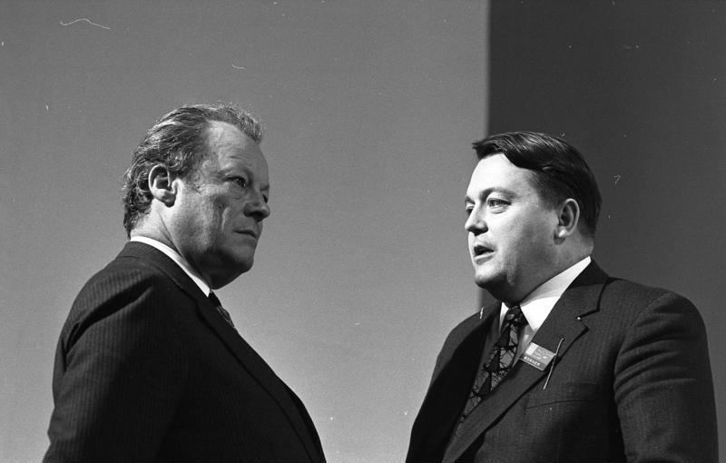 Bundesparteitag der SPD in Hannover 10.-14.4.1973